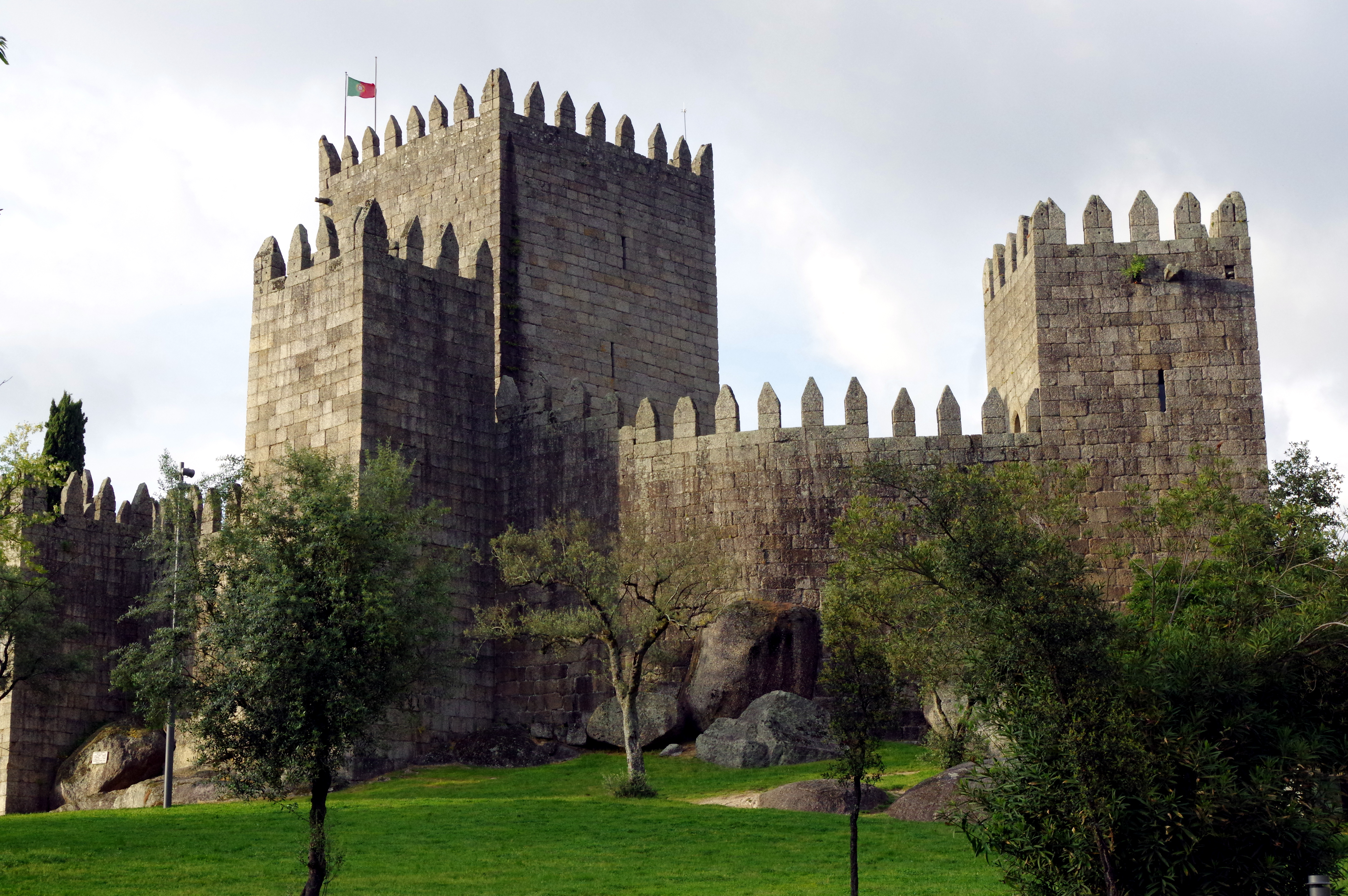 19.4.14 Guimaraes 61